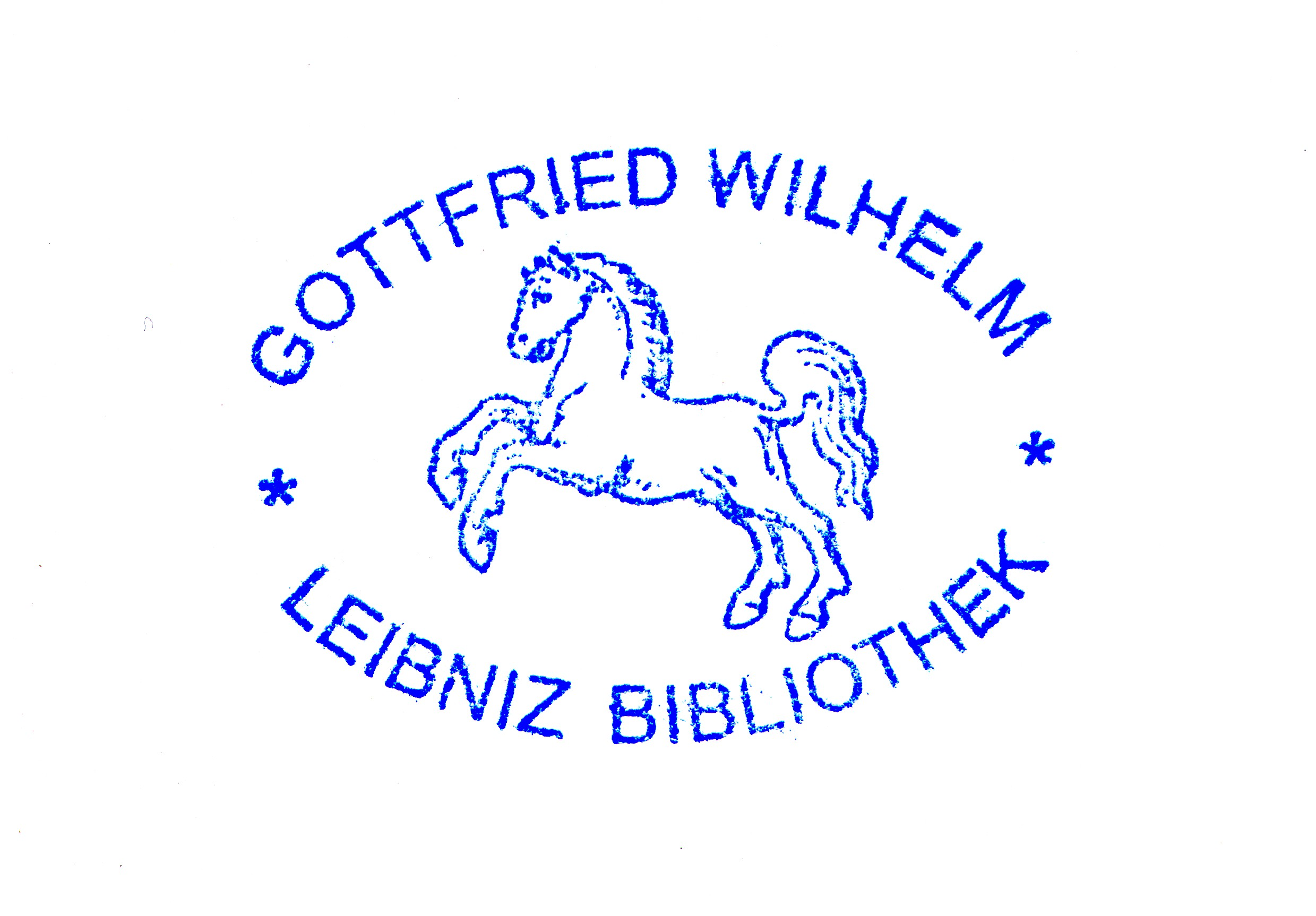 Besitzstempel in den Buchbeständen der Bibliothek.